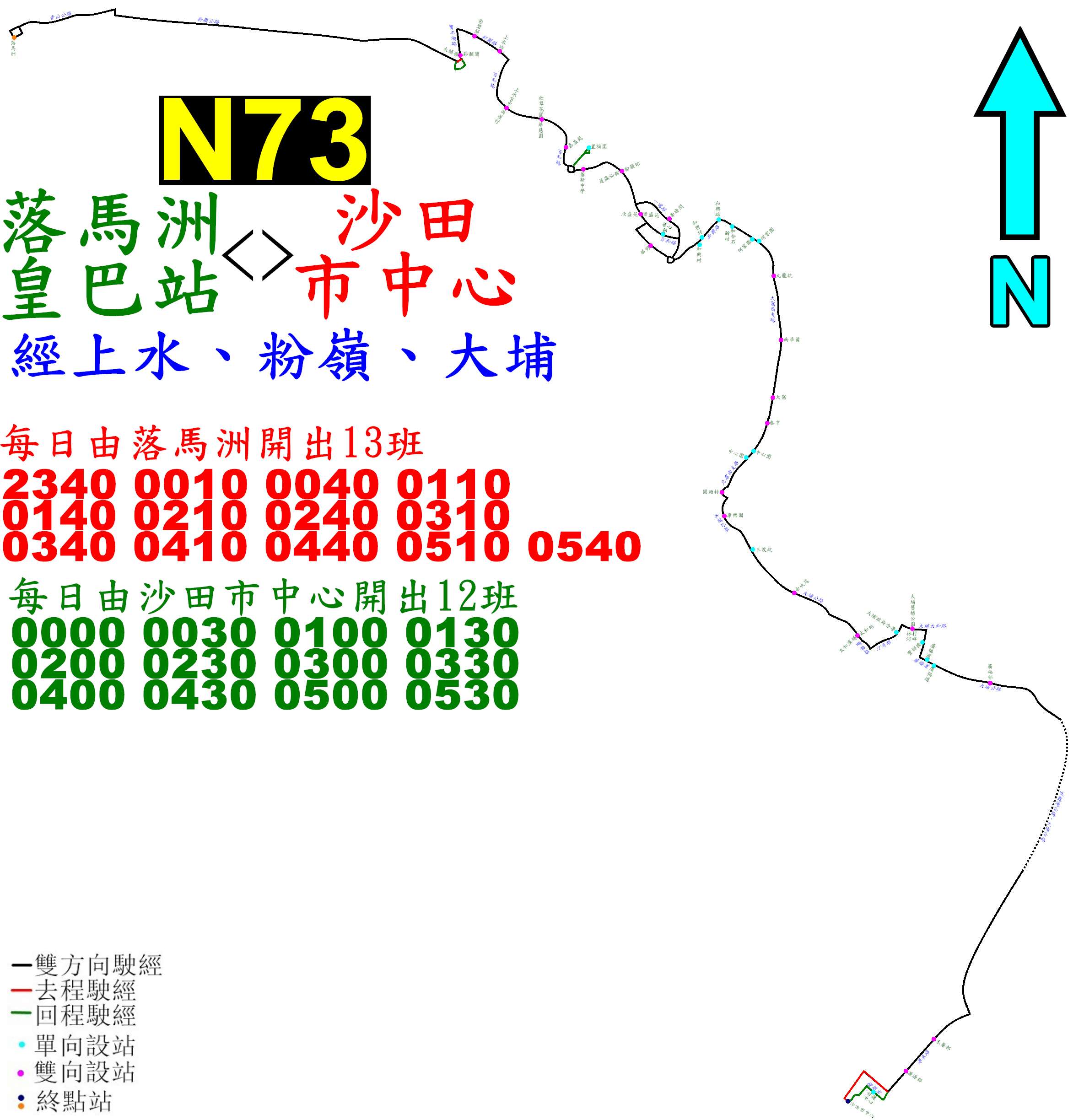 中文（香港）: 九巴N73線的走線圖